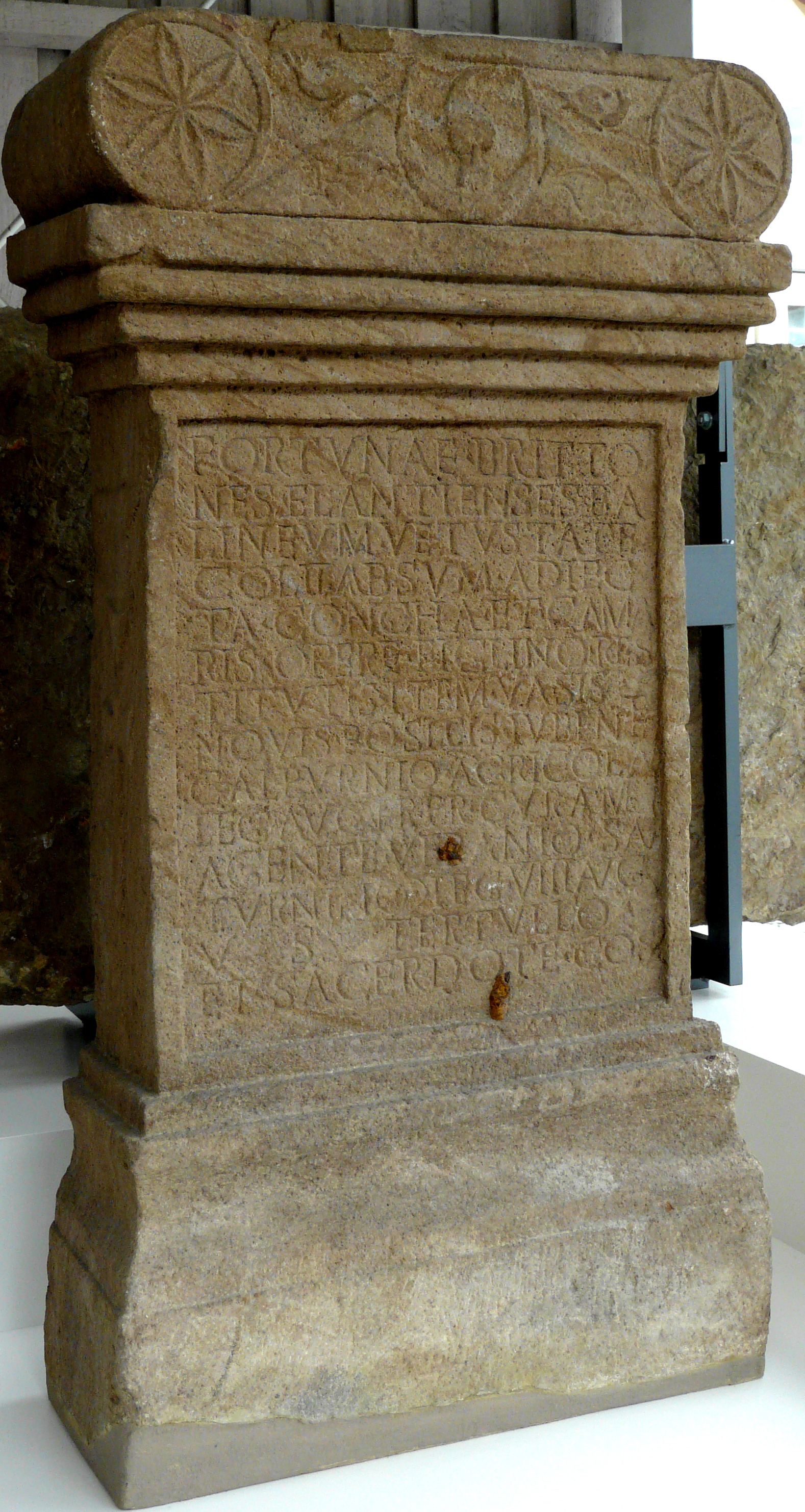 (Wiederherstellungs-)Bauinschrift AE 1986, 00523 der Thermen der Kastelle von Neckarburken am Odenwaldlimes, Aufbewahrungsort: Römermuseum Osterburken